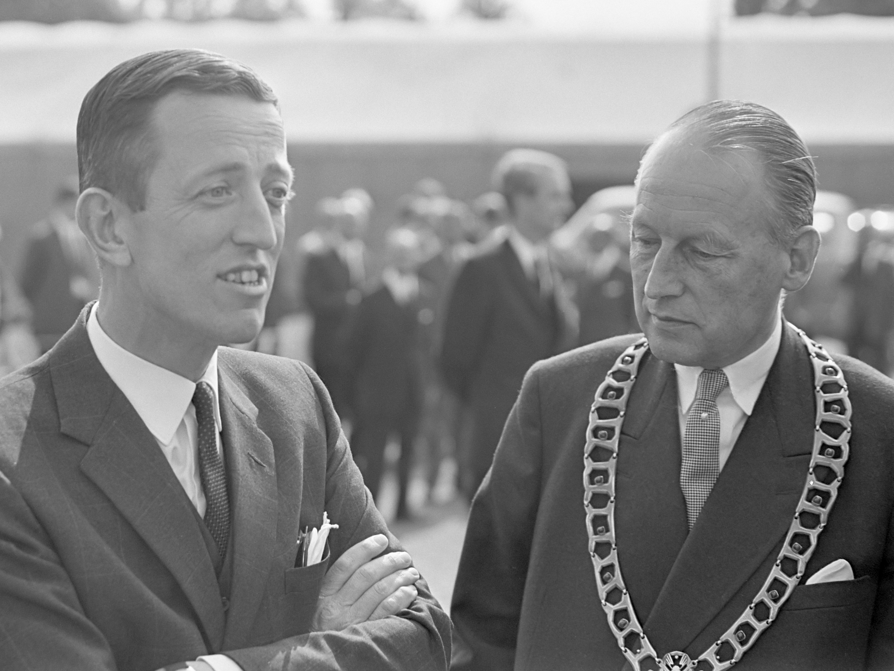 Prins Bernhard brengt een bezoek aan Twente. Tijdens de rondgang door de fabriek van Stork spreken directeur Sickinge en burgemeester Von Fisenne van Hengelo met elkaar. 5 september 1968